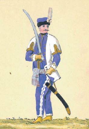 55. Szef 2 Pułku Ułanów Buławy Litewskiej ( oficer 2 pułku PS buławy wielkiej litewskiej